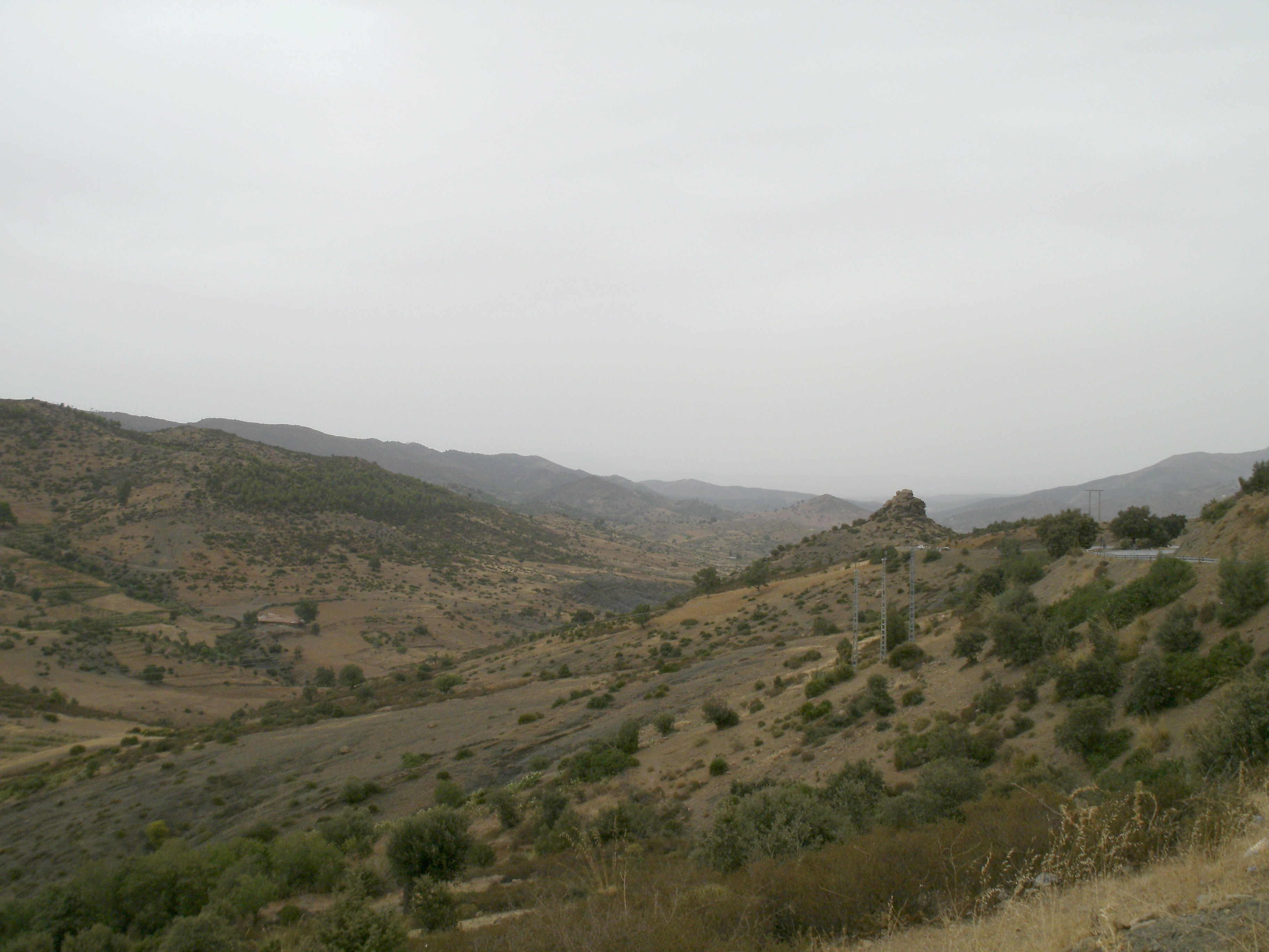 Paysage de l'Ouarsenis près du village de Tarik Ibn Ziad (wilaya d'Aïn Defla en Algérie).